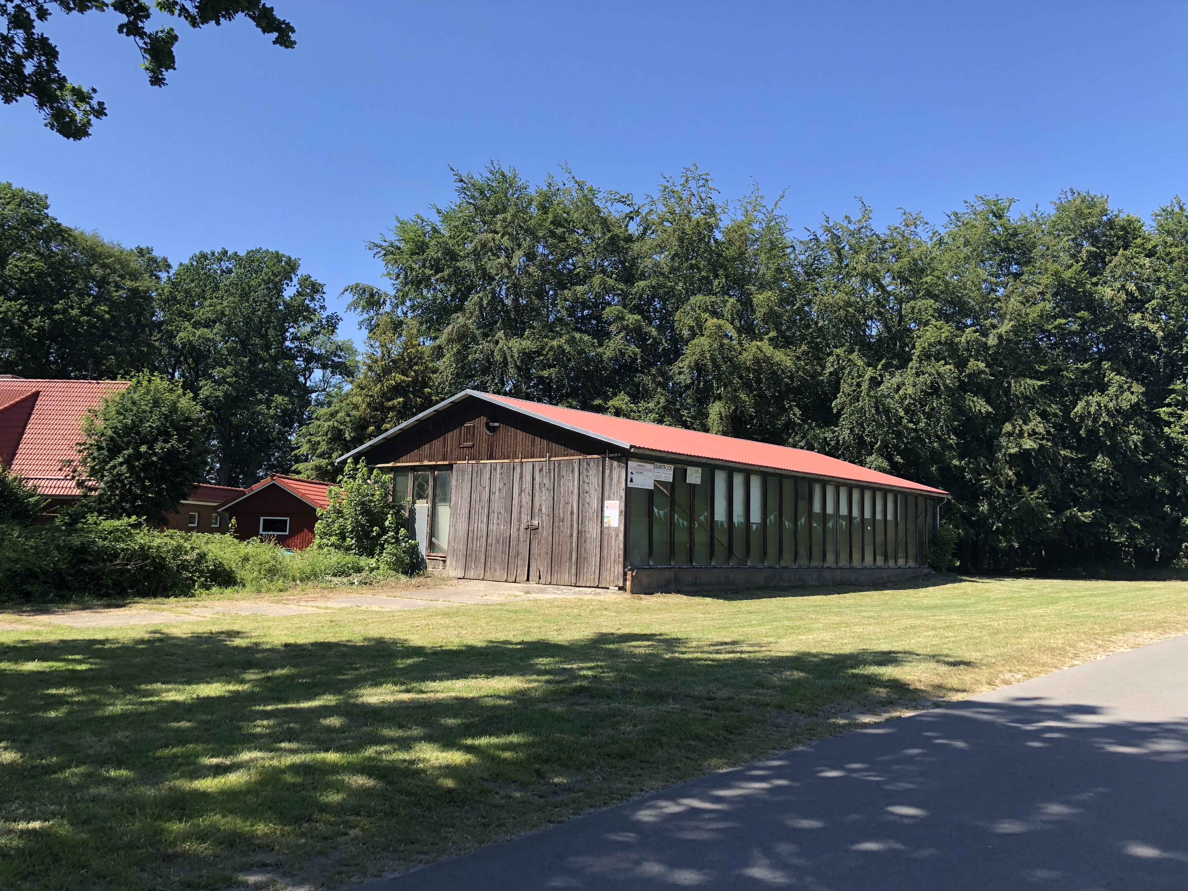 Vörkiemhuus in Sounsiek